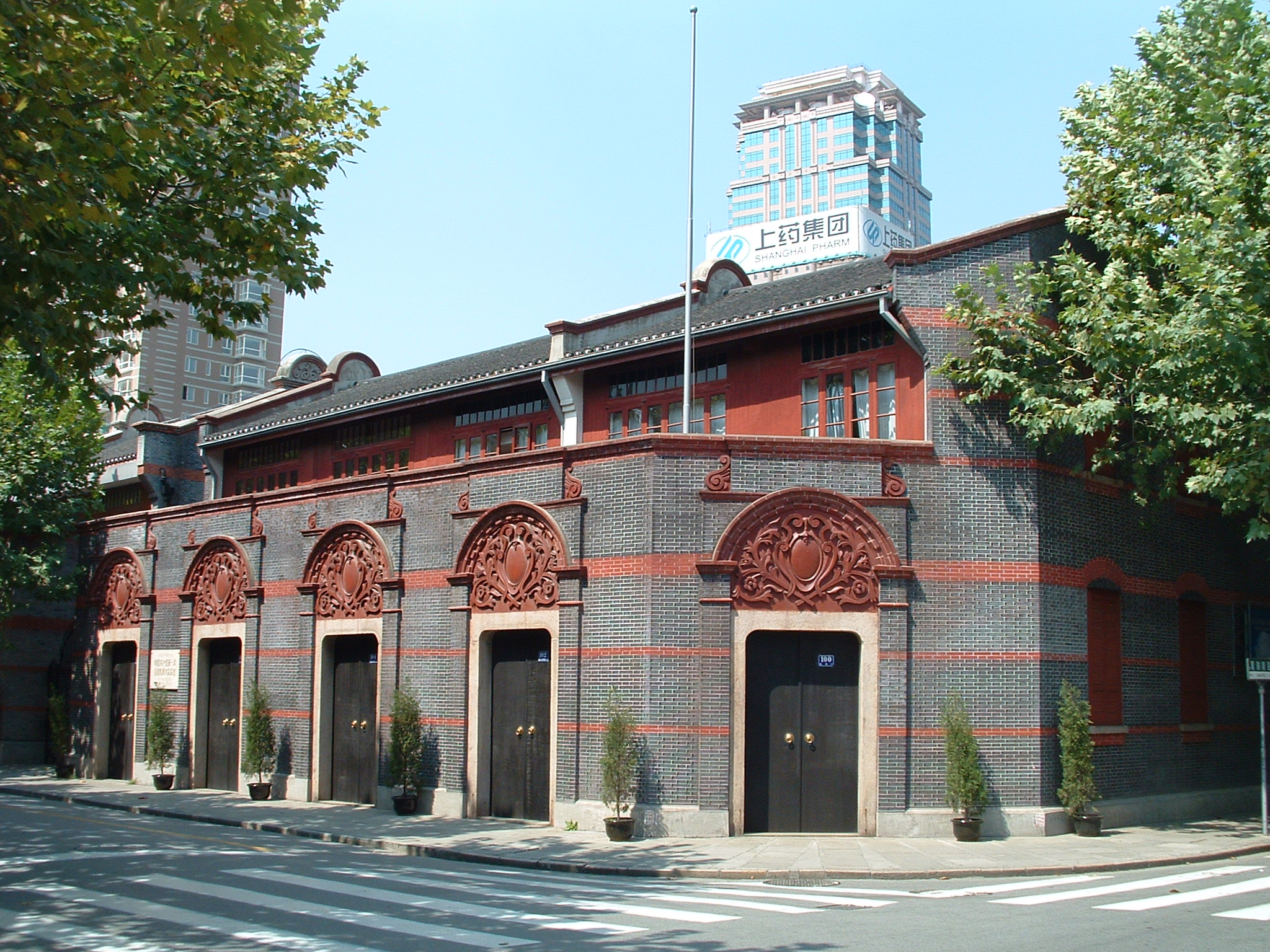 上海一大会址